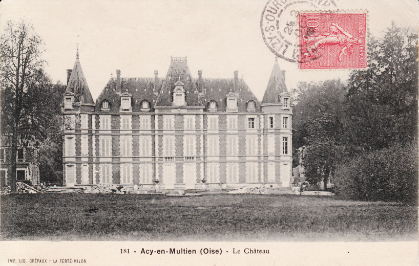 Château d'Acy